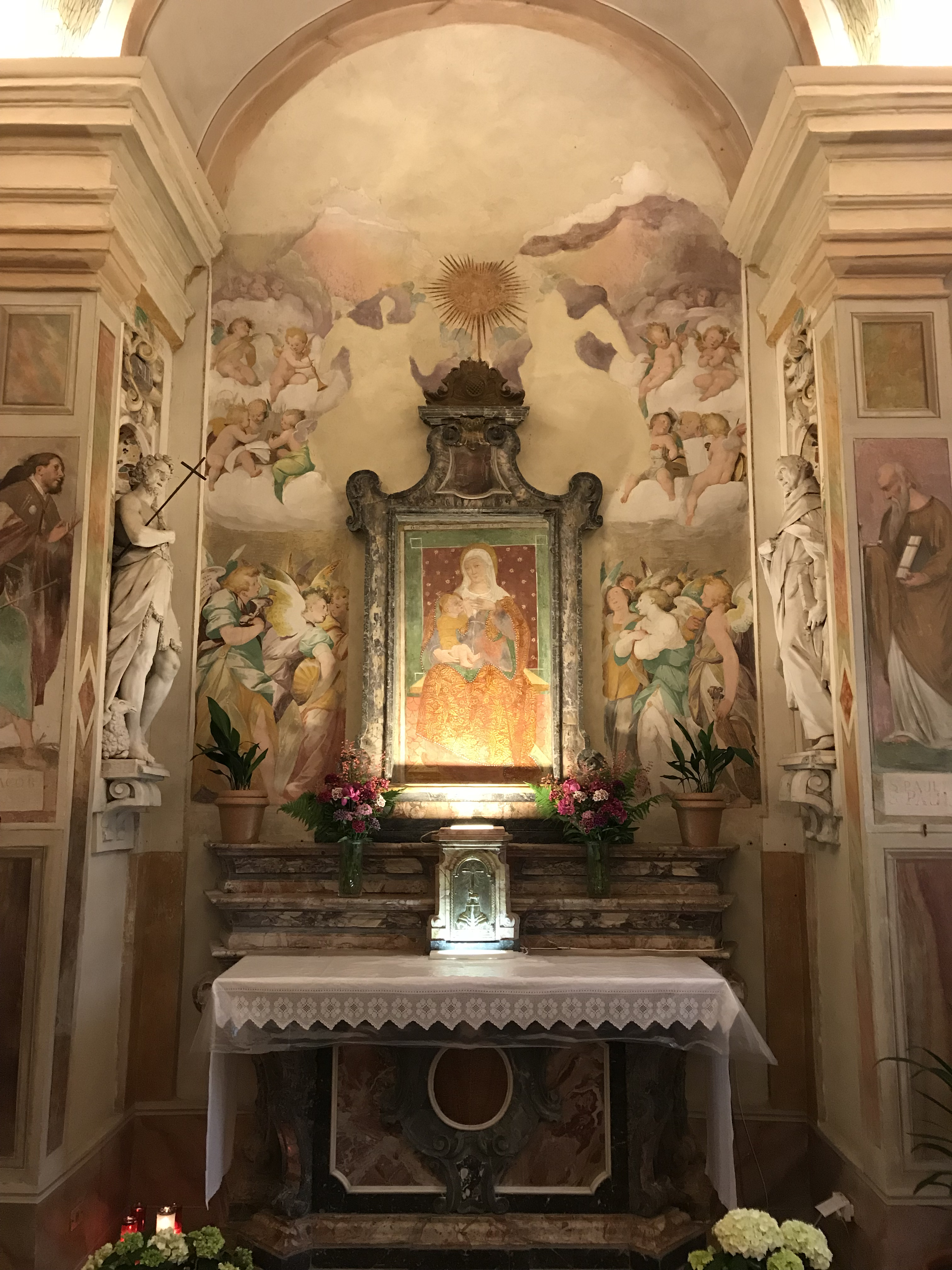 Madonna del Campo, frazione di Mortara: Santuario di Santa Maria del Campo, interno, abside affrescato, altare maggiore e dietro l'affresco della Madonna del latte, opera di Tommasino da Mortara eseguita nel 1514.